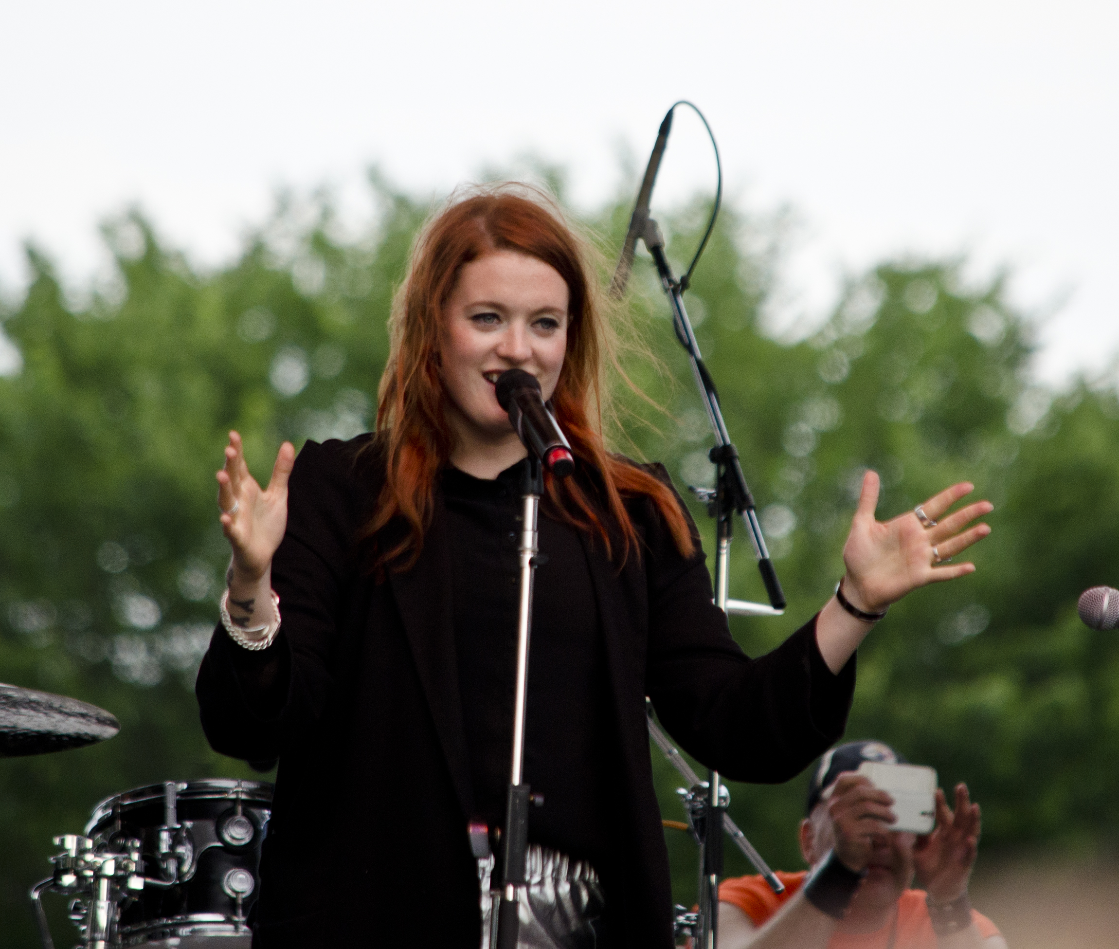 Icona Pop 002 - DC Capital Pride street festival - 2013-06-09